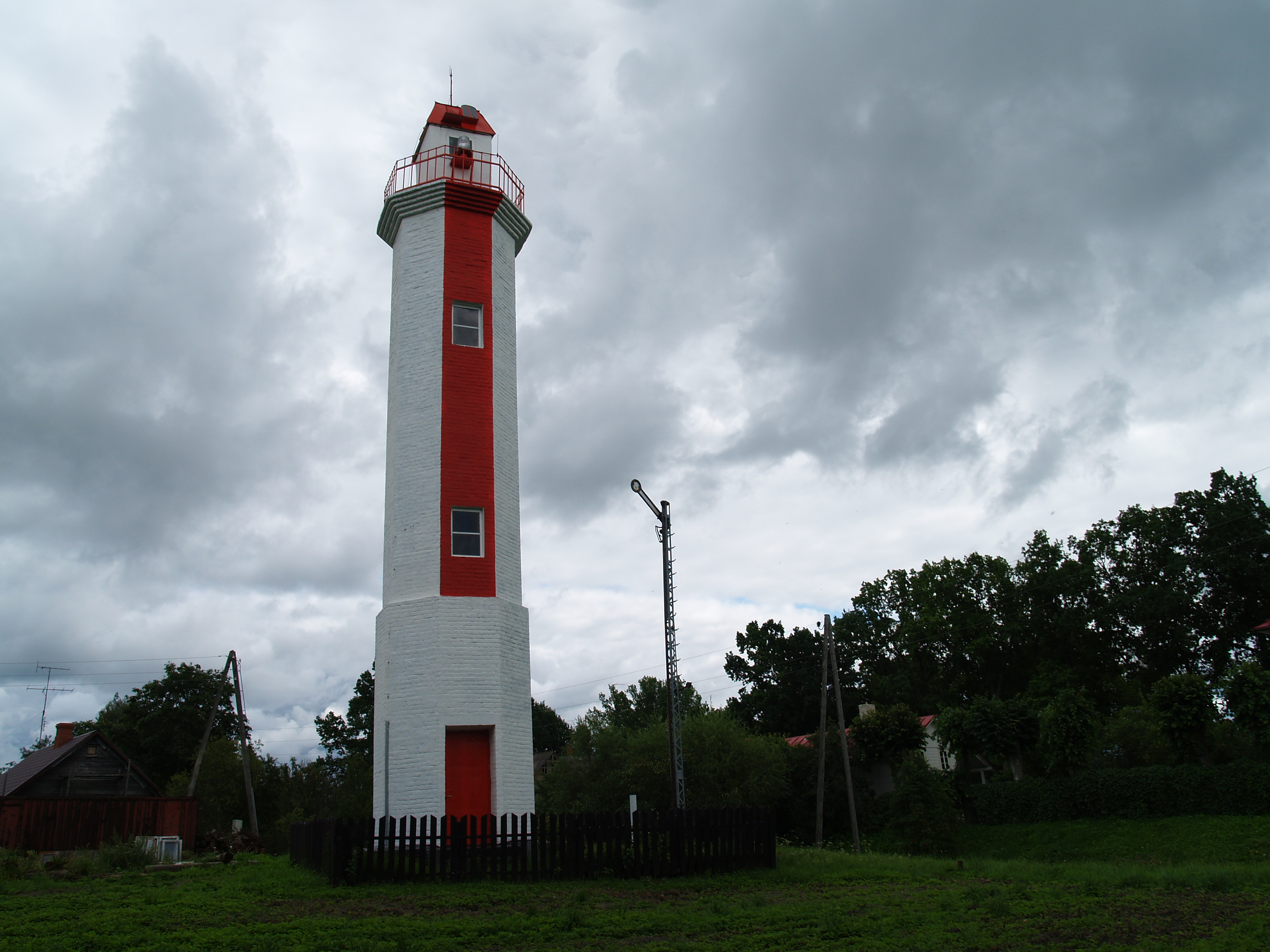 Heinaste majakas